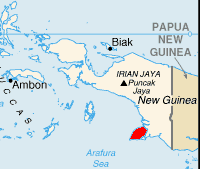 Pulau Yos Sudarso (merah)